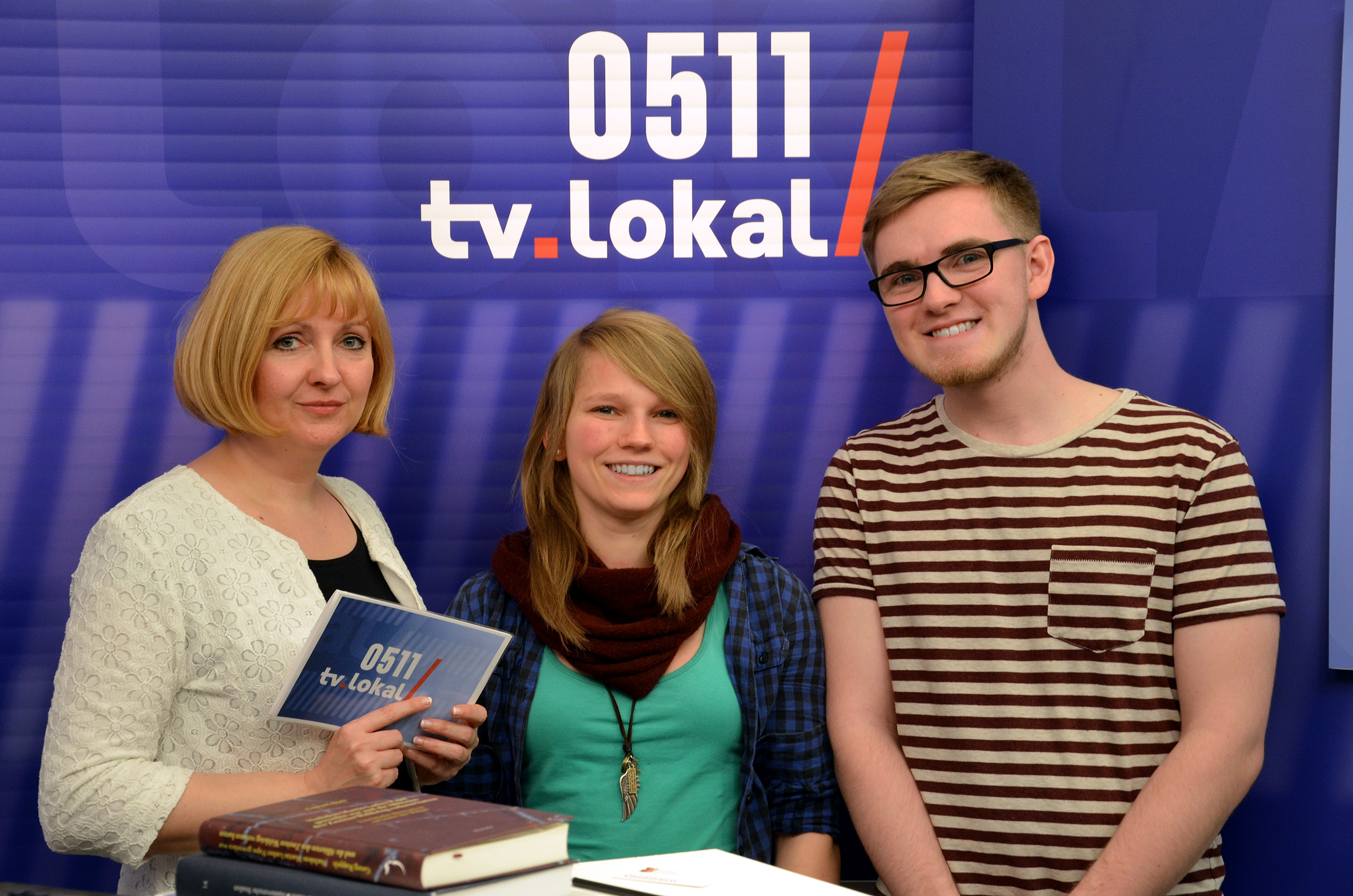 Recherche, Maske, Kamera, Schnitt, Ton, Technik, Beleuchtung, Moderation, Büroarbeiten, Saubermachen ... viele zumeist ehrenamtlich tätige Menschen sind am Zustandekommen einer Fernsehsendung von H1 - Fernsehen aus Hannover beteiligt. Von dem hinter den Kulissen von aussen mitunter kaum wahrgenommenen Team stellen sich hier - unmittelbar nach dem Interview mit Bernd Schwabe über die gemeinschaftliche Wissensverbreitung mittels Wikipedia oder Wikimedia Commons - mit ihrem Gesicht und ihrem guten Namen (von links): Renate Scheiblich, Vanessa Rohde und Mario Sadlau vom Team 0511/tv.lokal ...